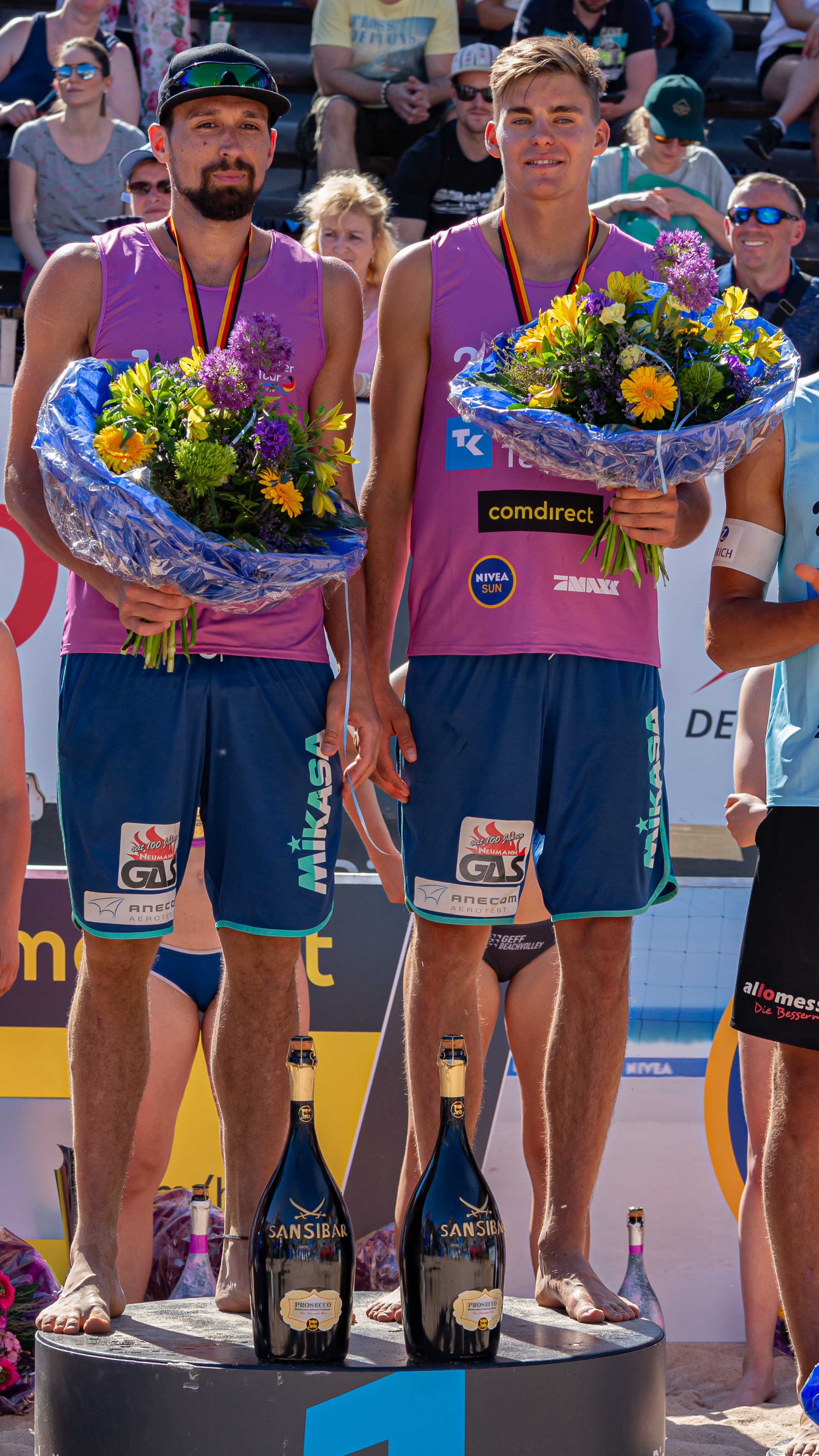 BeachVolleyball, Die Techniker beach tour Nürnberg; v.li.: Jonathan Erdmann (VCO Berlin), Max Betzien (VCO Berlin); Sieger, Erstplatzierter, Goldmedaille, gold medal; Flower Ceremony, Blumenzeremonie, Siegerehrung